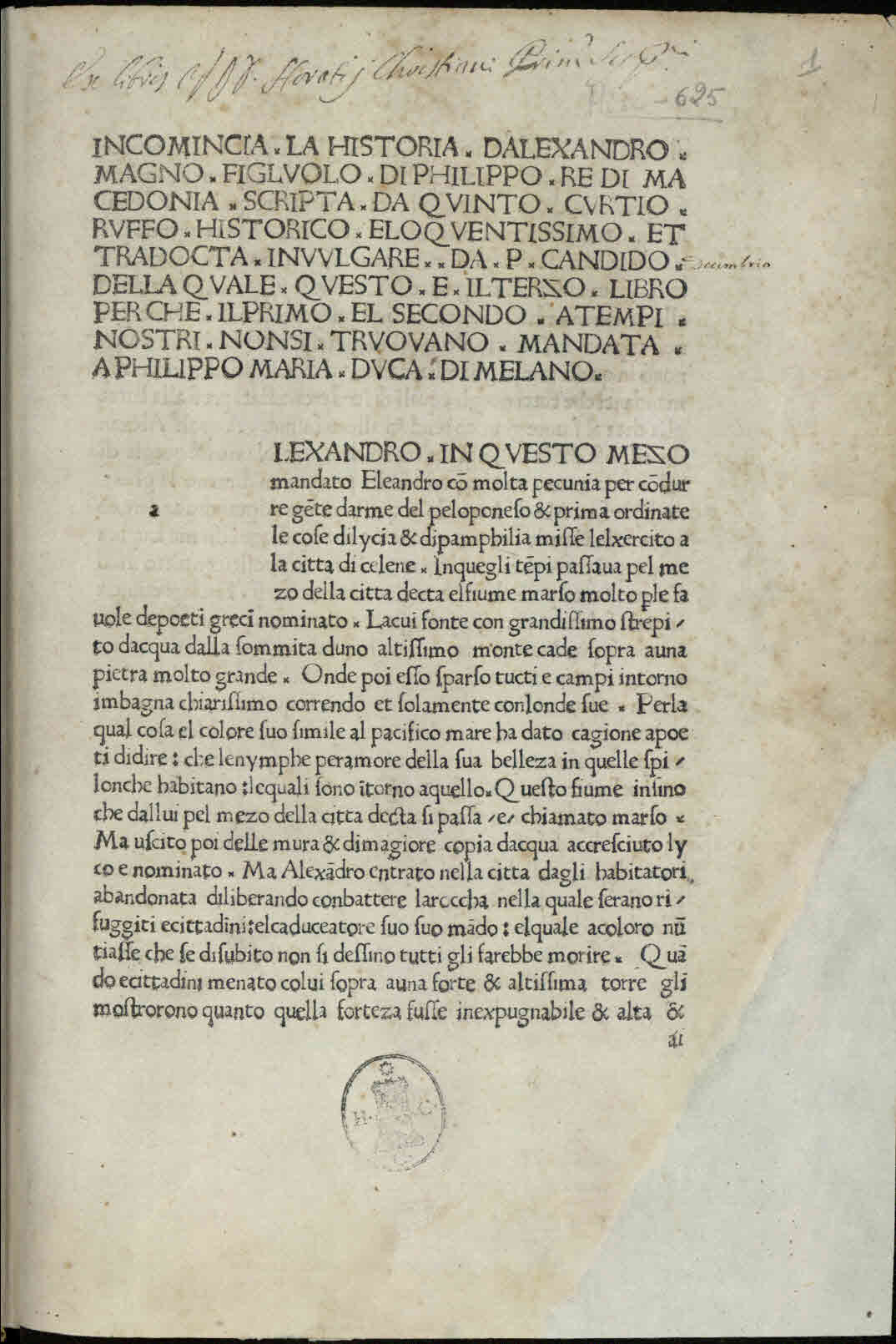 Historiae Alexandri Magni (italiano). Segue: Pier Candido Decembrio: Comparazione di Caio Iulio Cesare e d'Alexandro Magno. - Impressum Florentiae : Apud Sanctum Jacobum de Ripoli, Anno MCCCCLXXVIII. - 166 c. ; a⁸, b-f⁶, g-h⁴, I⁴, l-q⁴, r-s2,t-u⁴, x-z⁸, &⁸, [us]⁸, [rum]⁸, A-D⁸ ; fol. .